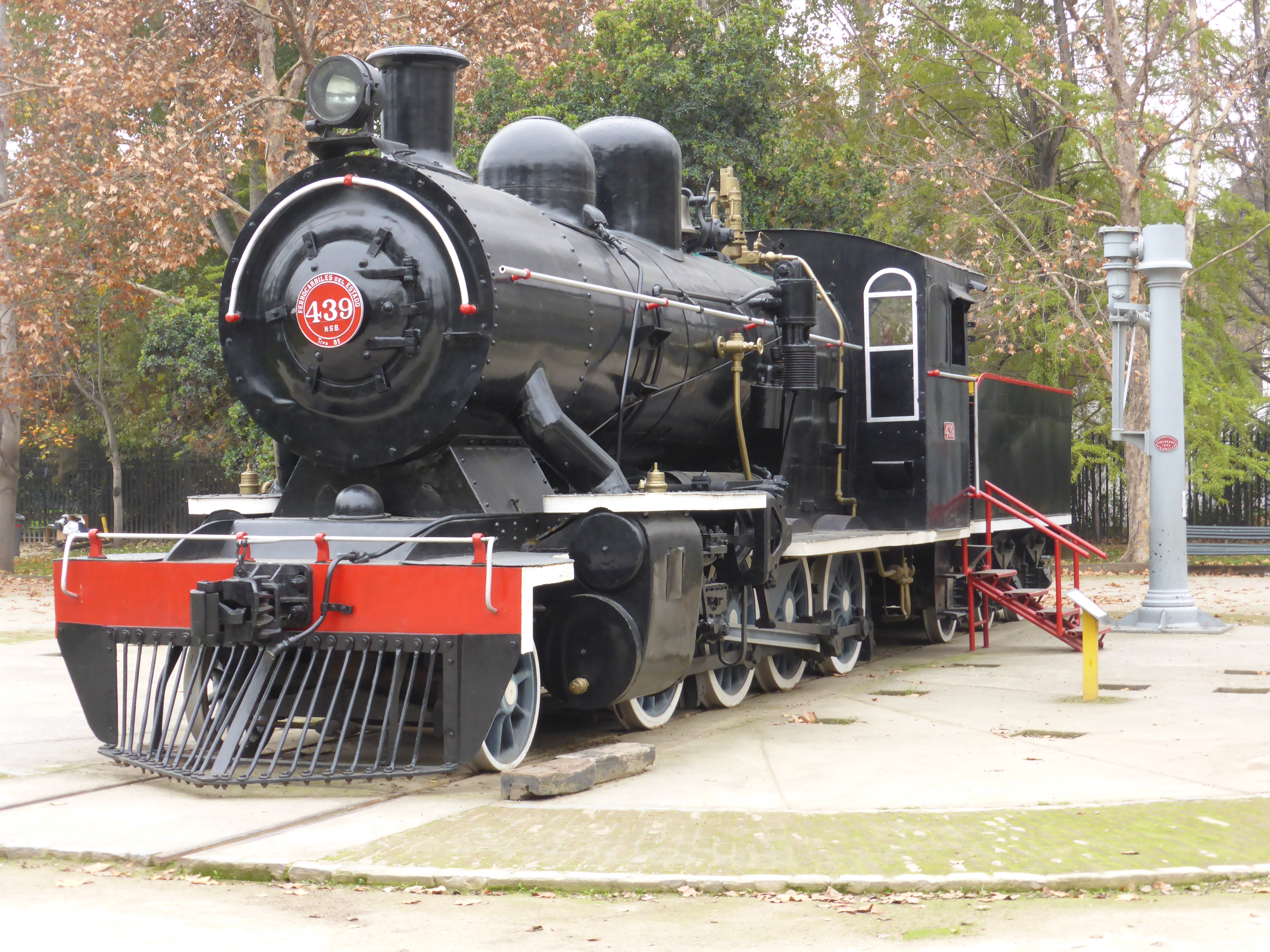 Locomotora de vapor fabricada en Alemania, en el año 1907, por "A. Borsig", de Berlín-Tegel. Para trenes de carga o mercantes, de trocha o vía ancha. Se encuentra en el parque "la Quinta Normal", en el recinto del Museo Ferroviario de Santiago de Chile.